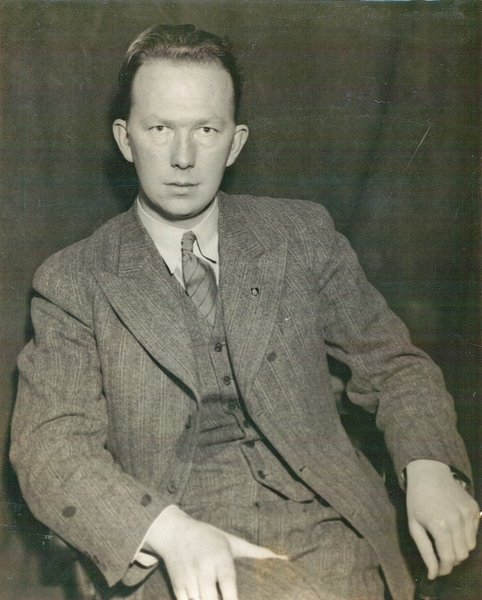 portrett, mann, forfatter, redaktør, sittende halvfigur.